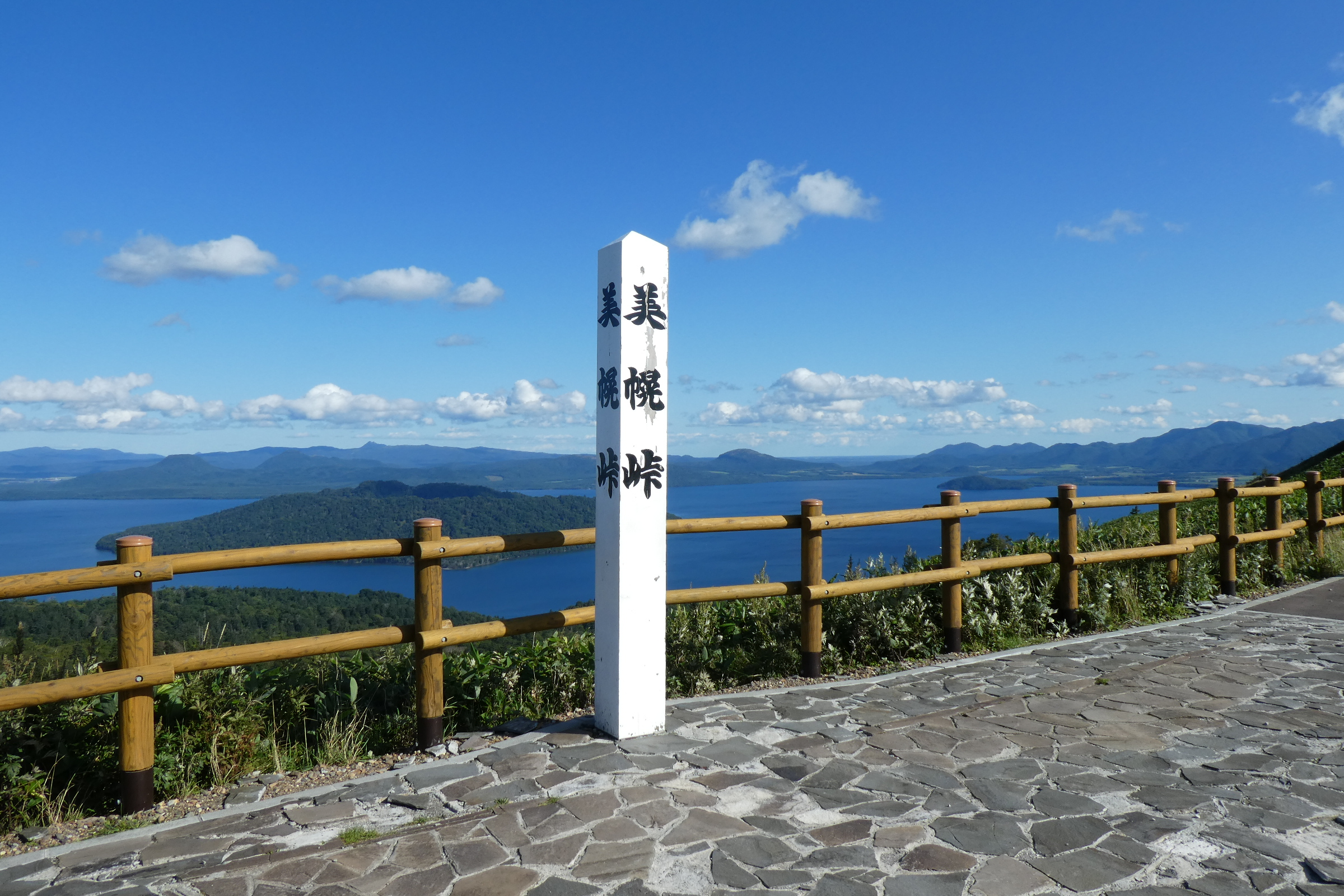 美幌峠標柱。天気晴れ。